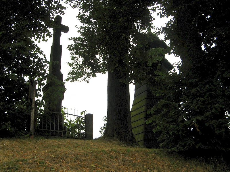 Zvonice, při čp. 67, Bohousová.